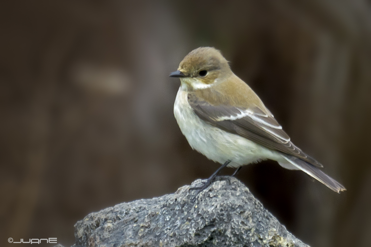 Papamosca cerrojillo. (Ficedula hypoleuca)(♀)